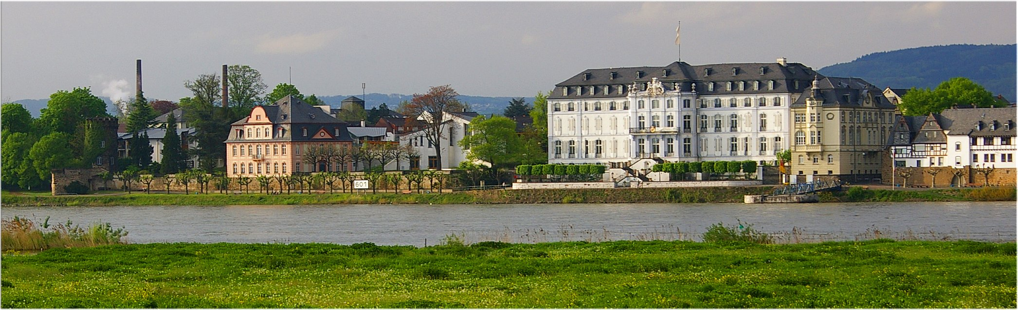 Engers mit Schloss Engers